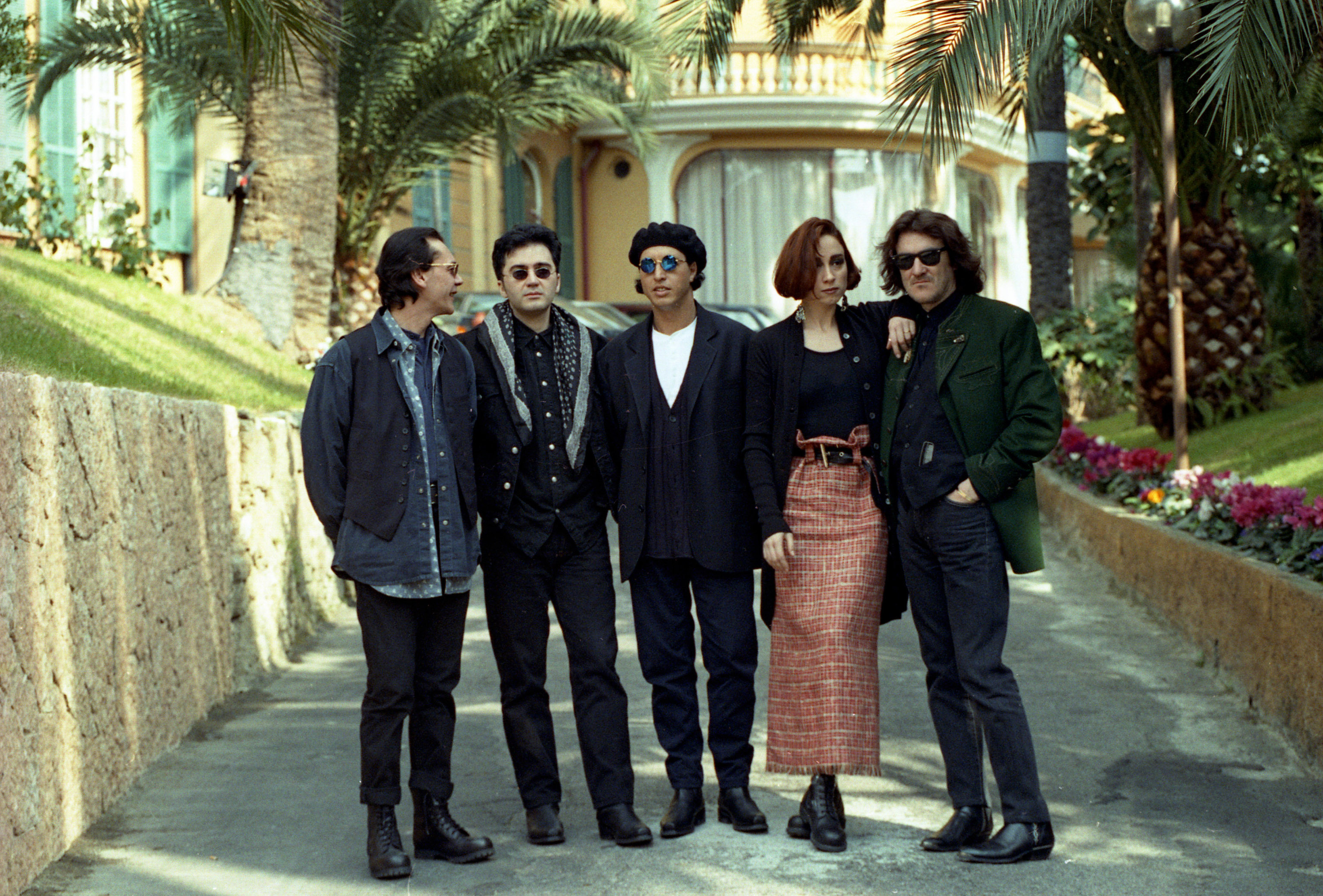 Italia, 1993. Il gruppo musicale italiano dei Matia Bazar; da sinistra: il bassista Aldo Stellita, il tastierista Sergio Cossu, il chitarrista e voce Carlo Marrale, la vocalist Laura Valente e il batterista Giancarlo Golzi. Licensing 1993 1993 1993 1993